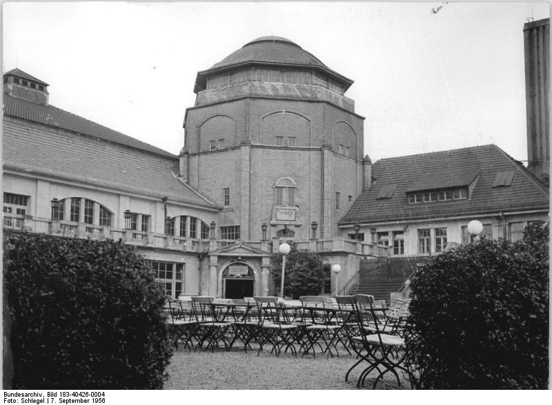 Leipzig, Haus Auensee, Terrasse Zentralbild Leipzig 7.9.1956 Schlegel Haus Auensee in Leipzig , in dem die gesamtdeutschen Konferenz der Betriebs- und Gewerkschaftsfunktionäre während der Leipziger Messe stattfand. UBz: Haus Auensee